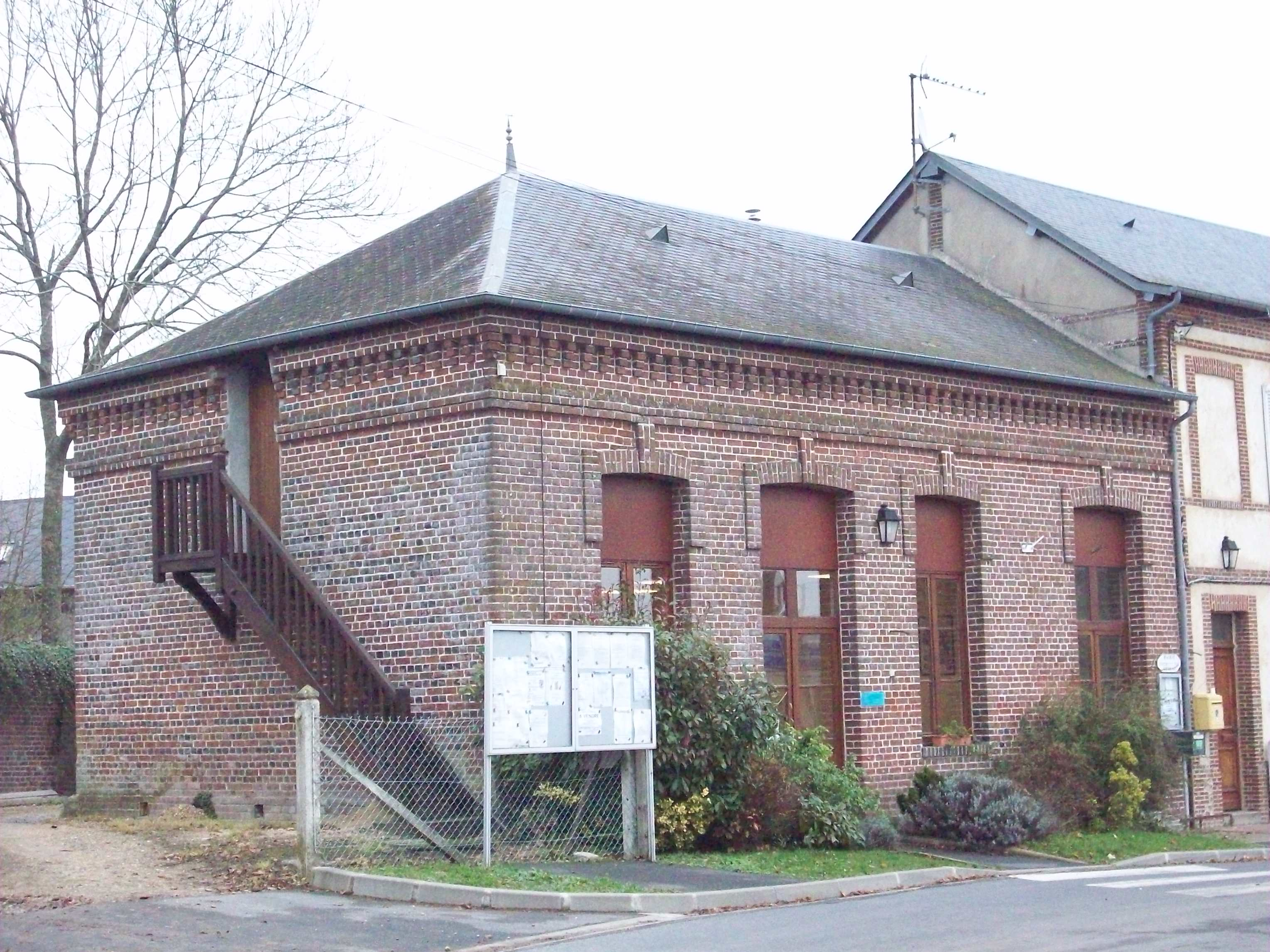 Mairie de Brémontier-Merval.